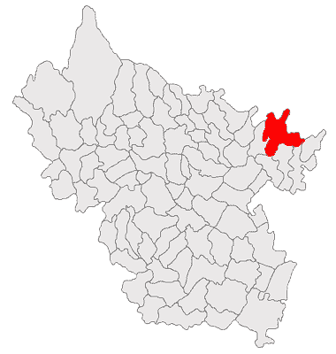 Categorie:Hărţi ale judeţului Buzău